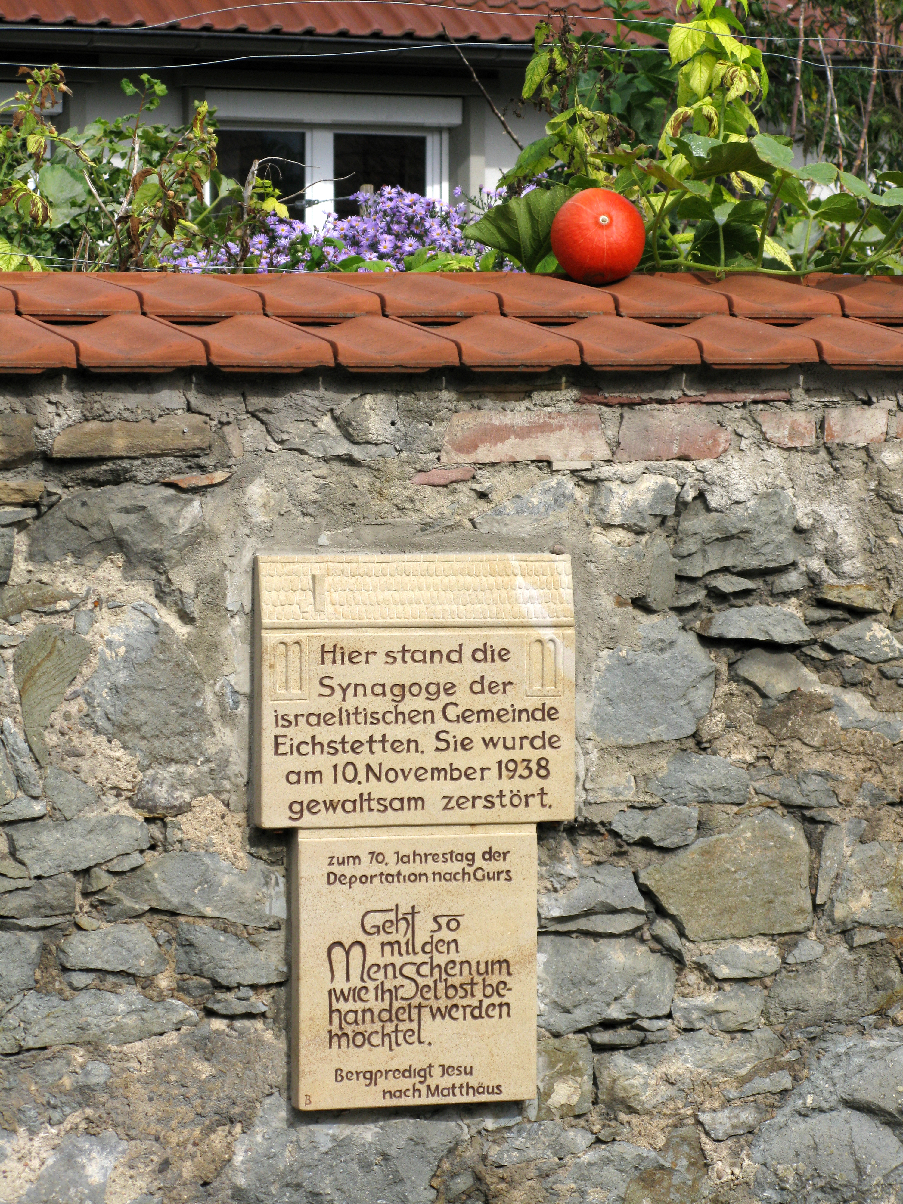 Gedenktafel am Standort der Synagoge in Eichstetten